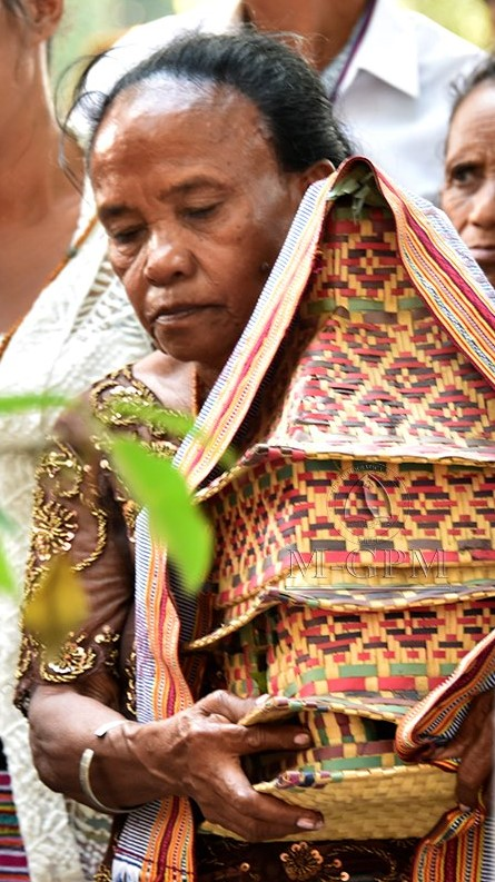 Eine Frau trägt ein Koba in Form eines heiligen Hauses bei einer traditionellen Zeremonie in der Landeshauptstadt Dili